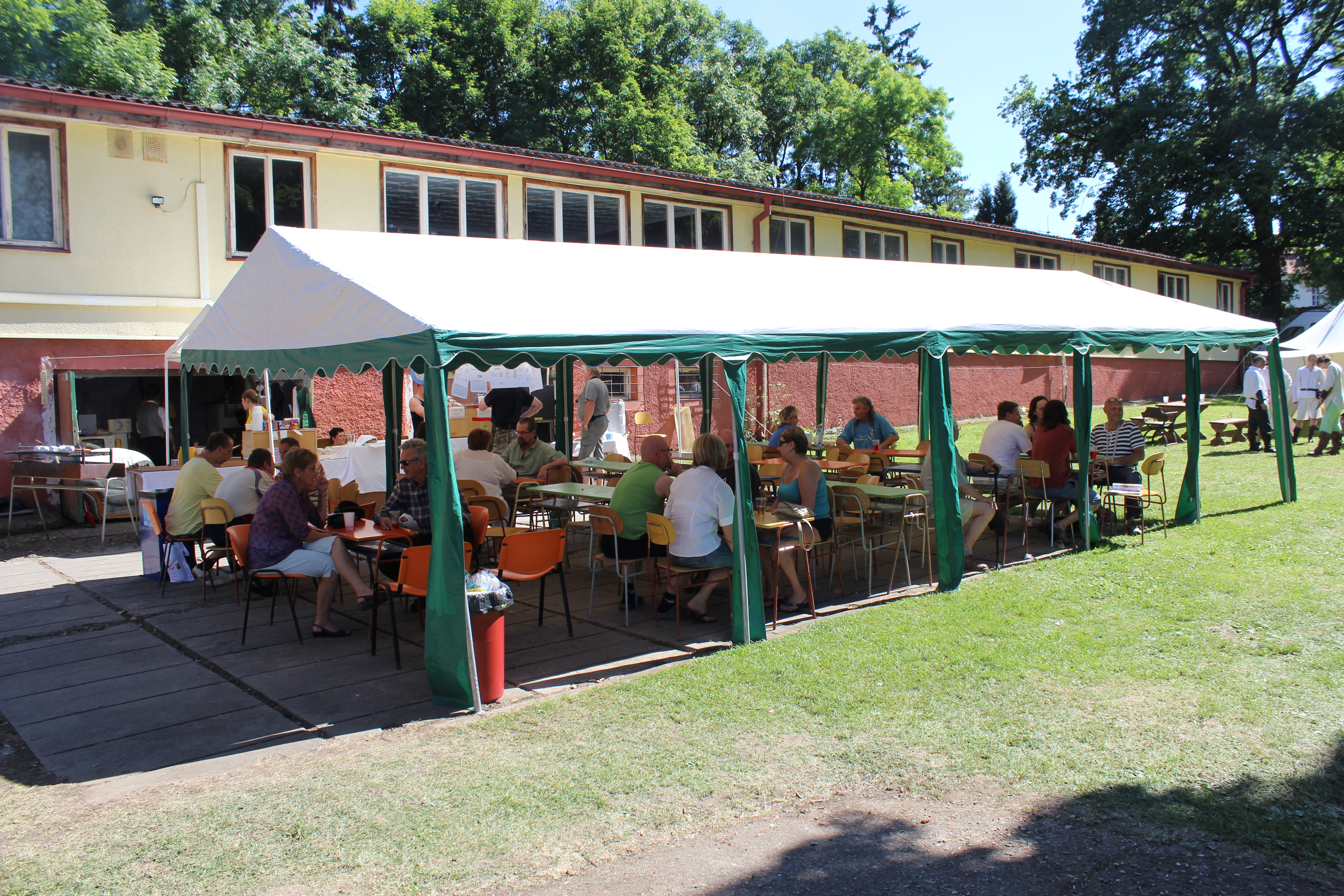 V Litni (okres Beroun) se o víkendu 7. a 8. 6. 2014 konalo 1. setkání kovářů, podkovářů, dráteníků, klempířů a všech, kteří pracují s kovem s názvem „Kováři v Litni“. Příští „Kováři v Litni“ se konají 6. – 7. 6. 2015 opět v Areálu Liteň a budou spojeni se setkáním absolventů škol, které zde působily: Středního odborného učiliště a Učňovské školy zemědělské, obor kovář – podkovář. Pořadateli jsou Atelier Svatopluk, o.p.s. Liteň a Kovárna pro radost v Kytíně.